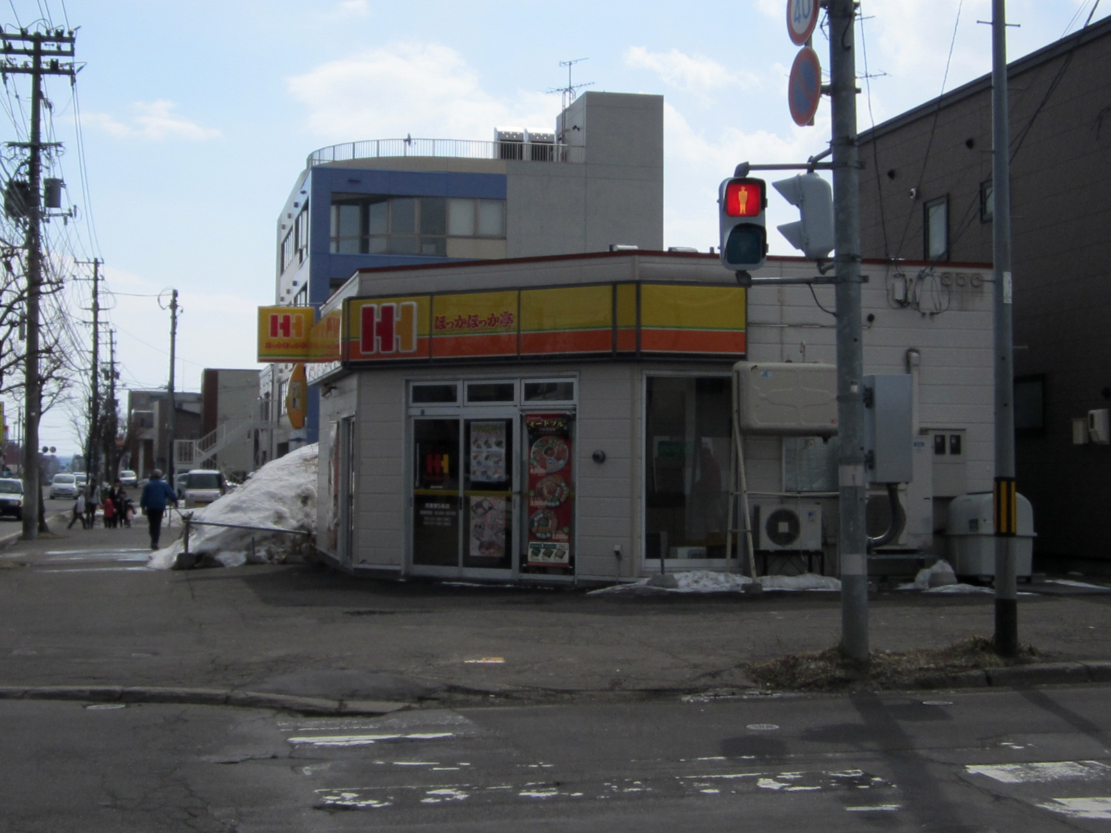 ほっかほっか亭 月寒東5条店（北海道札幌市豊平区）